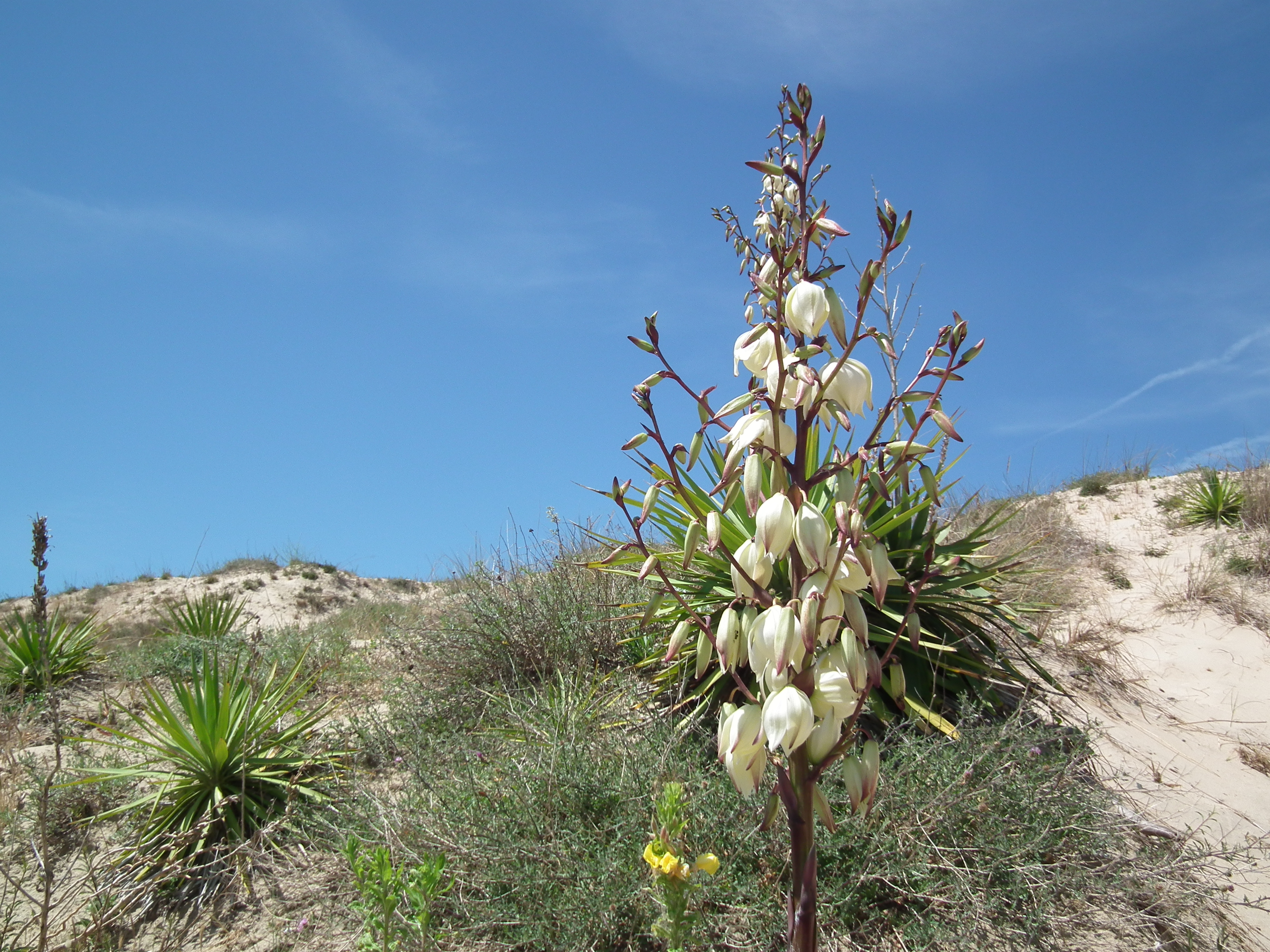 Flore de la pointe de Grave